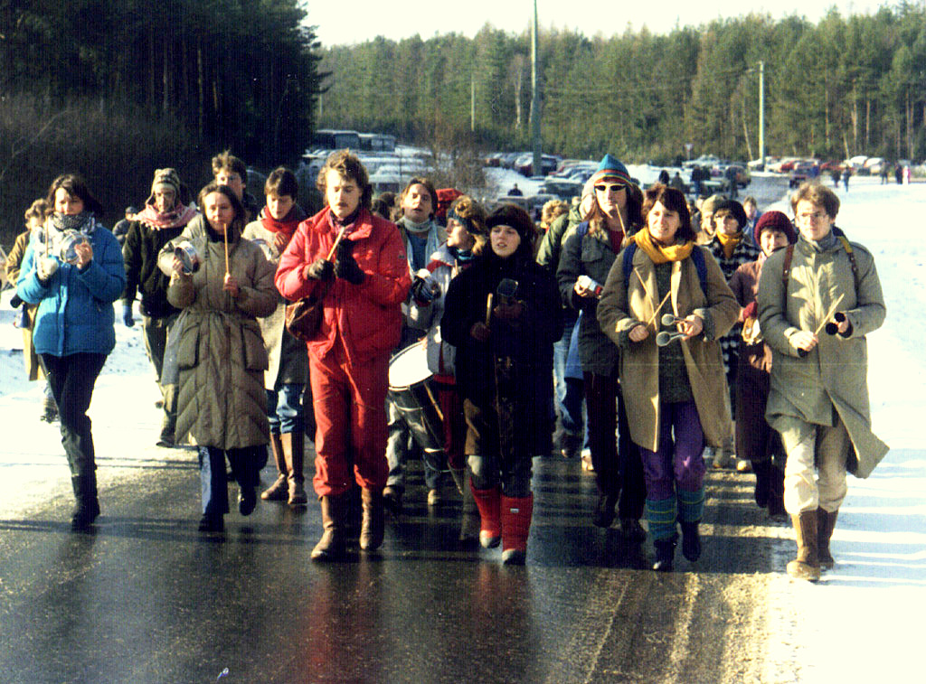 Münchner Ruhestörung 1986 vor der WAA-Wackersdorf. (Anti-Atomkraft-Demo)